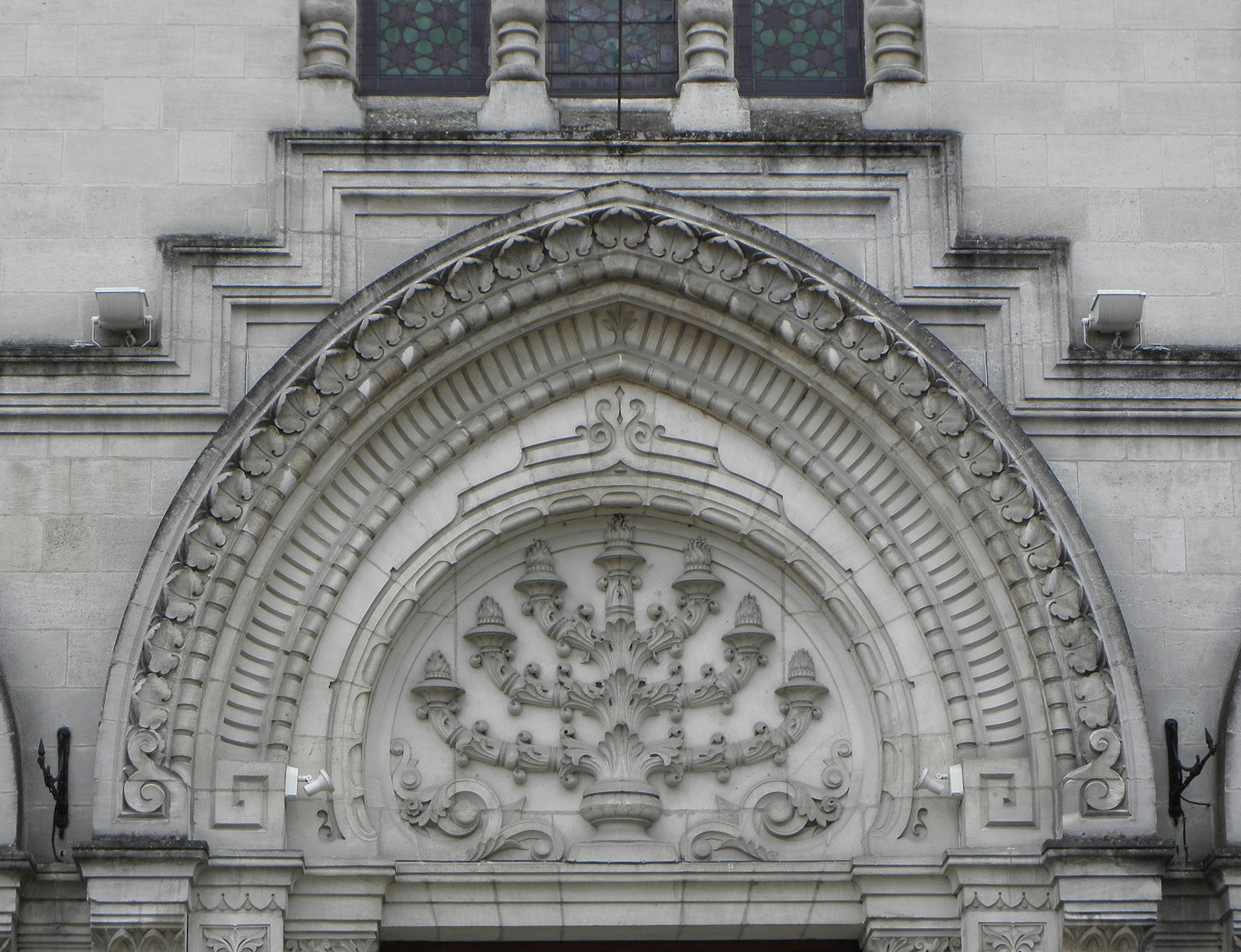 Grande Synagogue de Bordeaux (33).